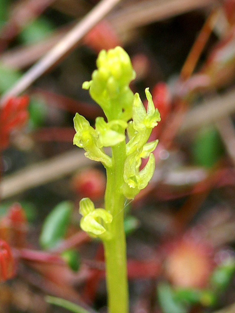 Hammarbya paludosa